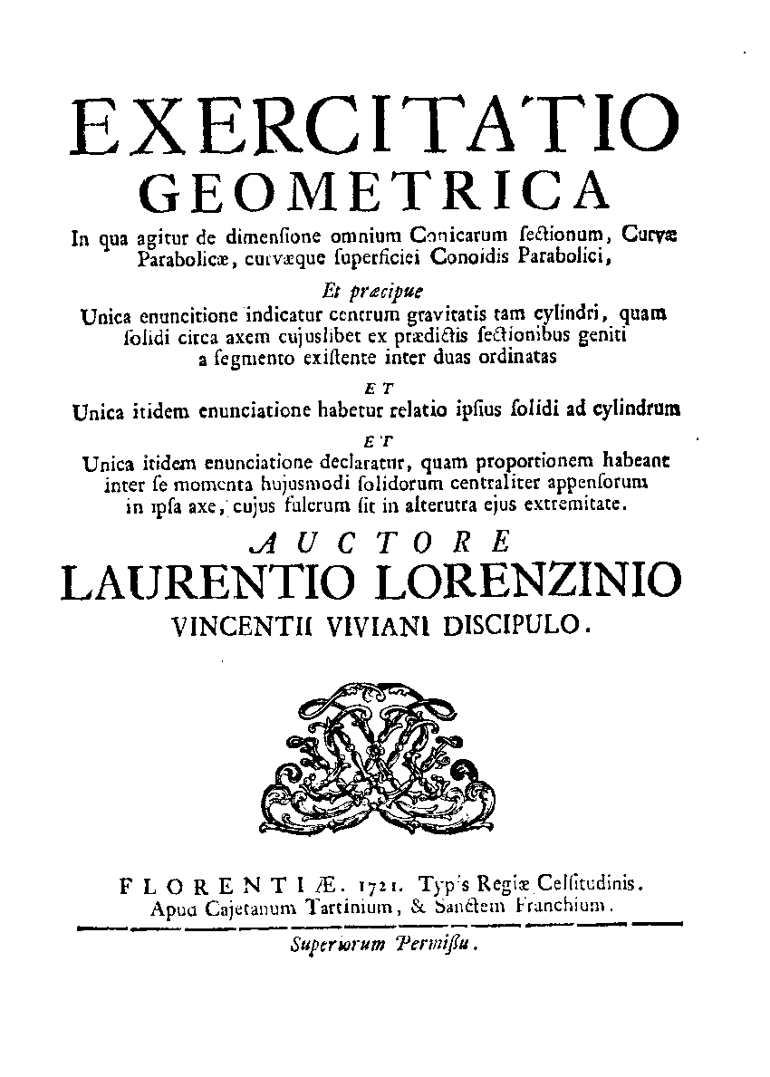 Frontespizio